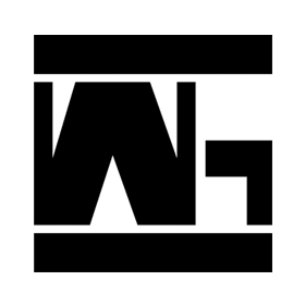 Logo von Weissglut - A Tribute To Rammstein